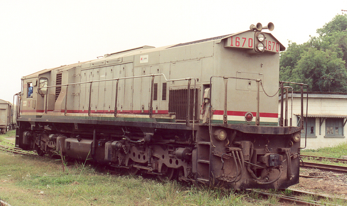 Ghana Railways 1670